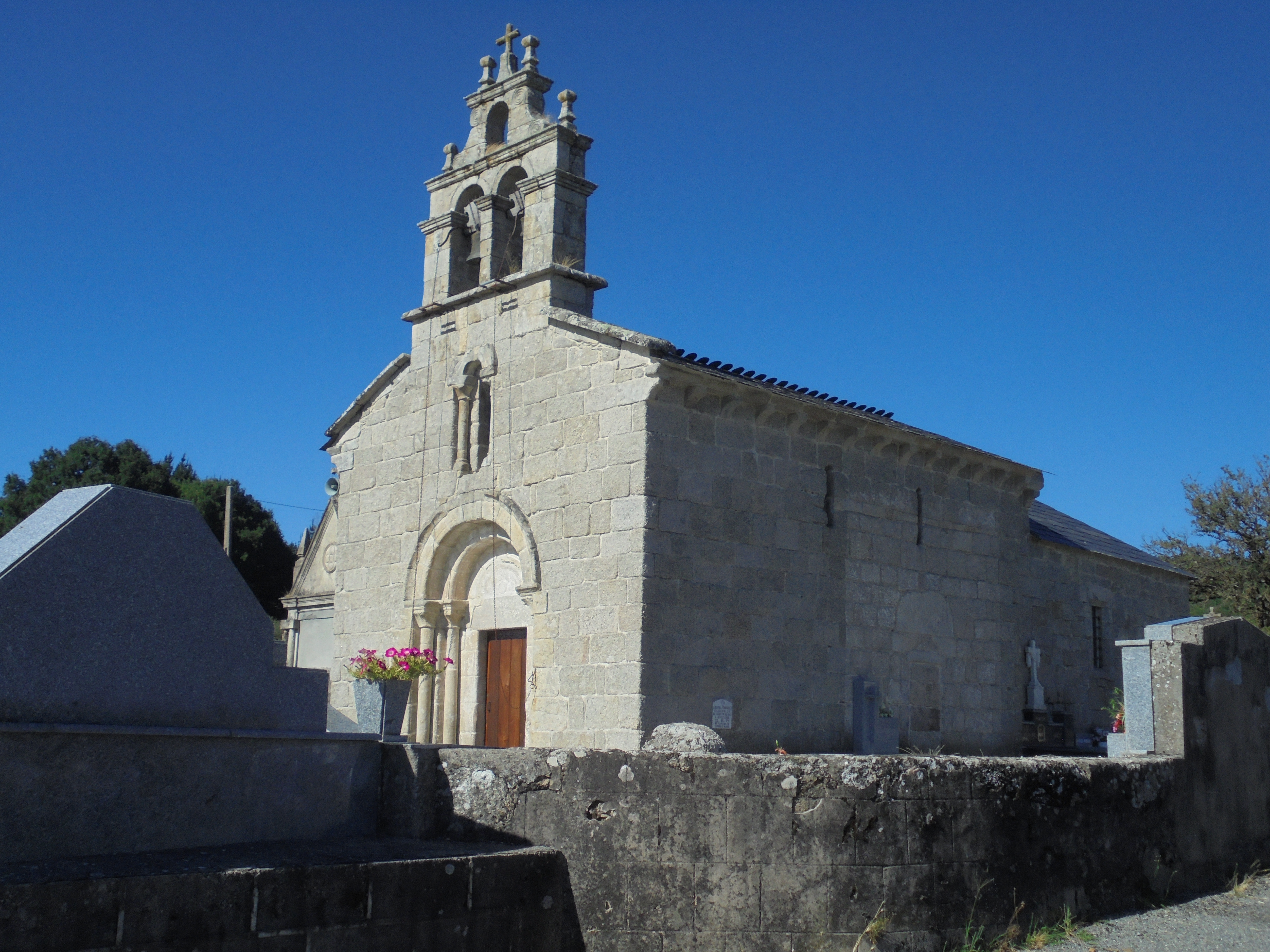 Igrexa parroquial de Franqueán ( O Corgo)